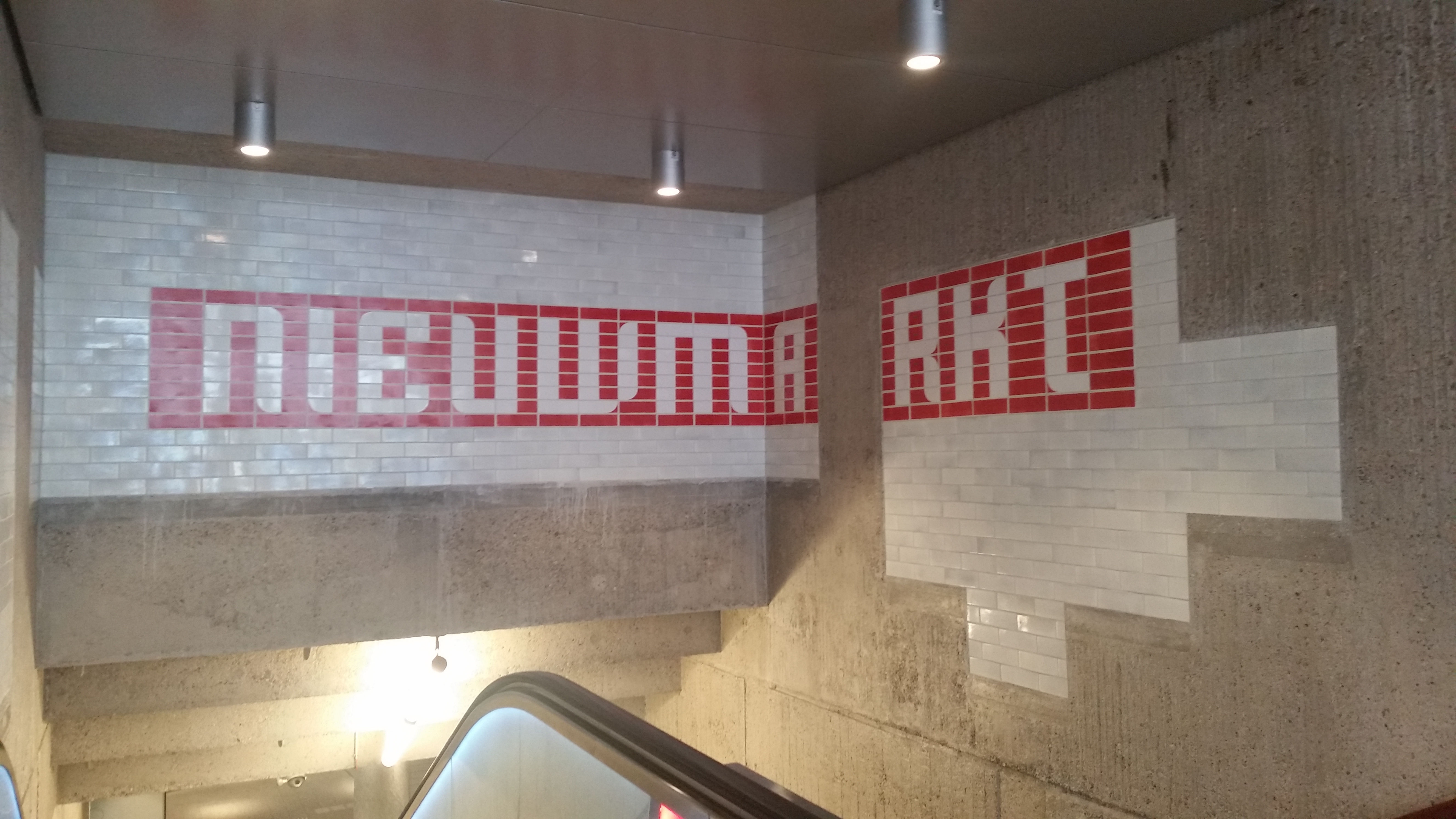 In 2017, 2018 kreeg het station een nieuw naambord, tegelwerk van koninklijke Tichelaar